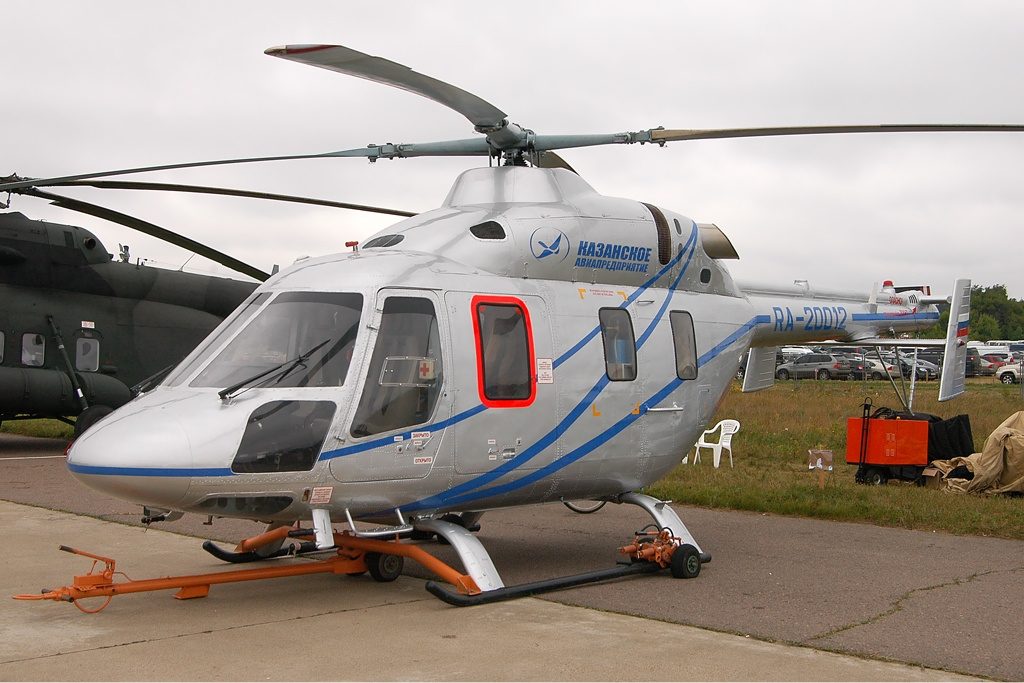 Kazan Air Enterprise Kazan Ansat